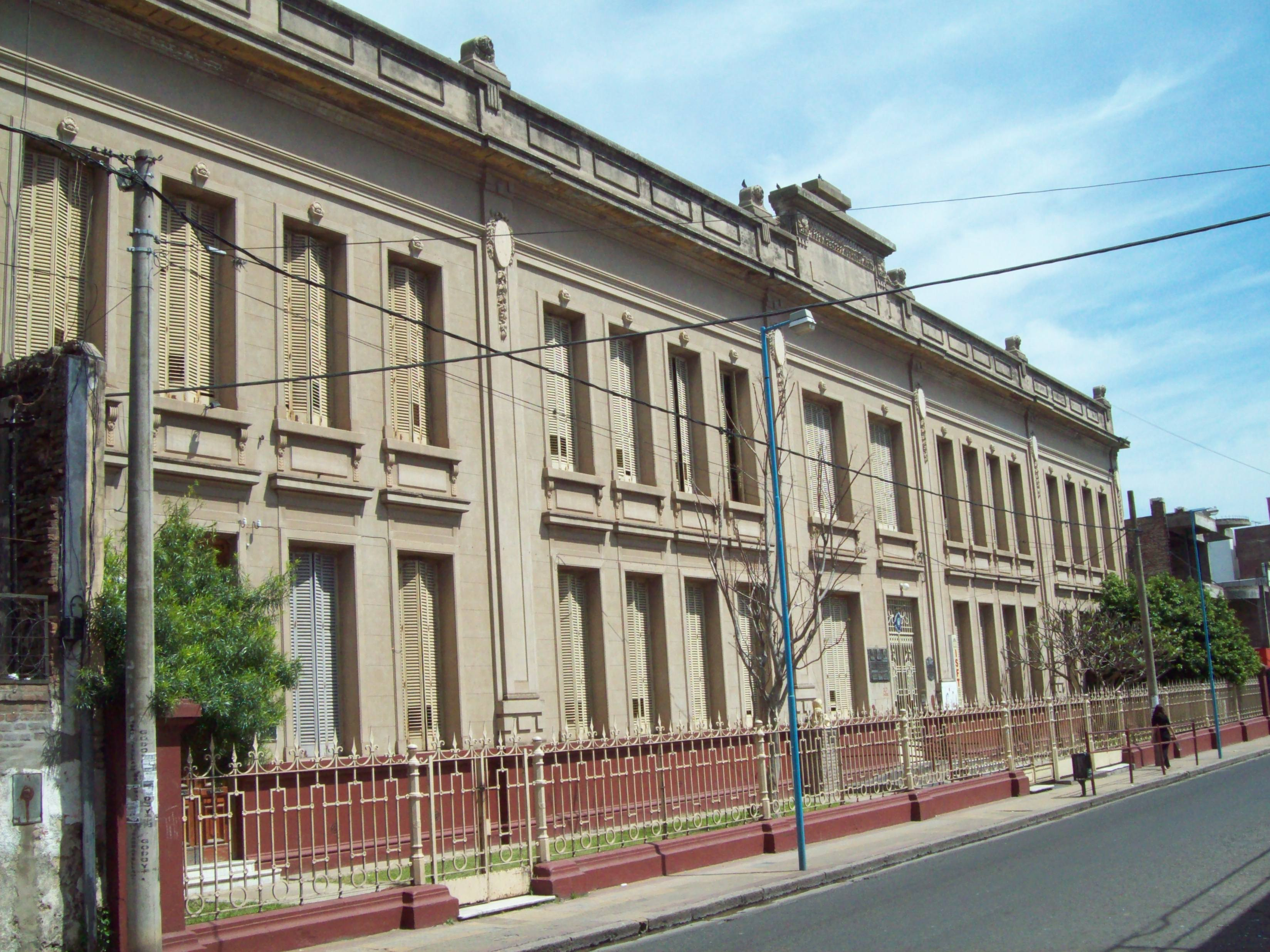 Escuela N.º 1 "Melchor Echagüe"